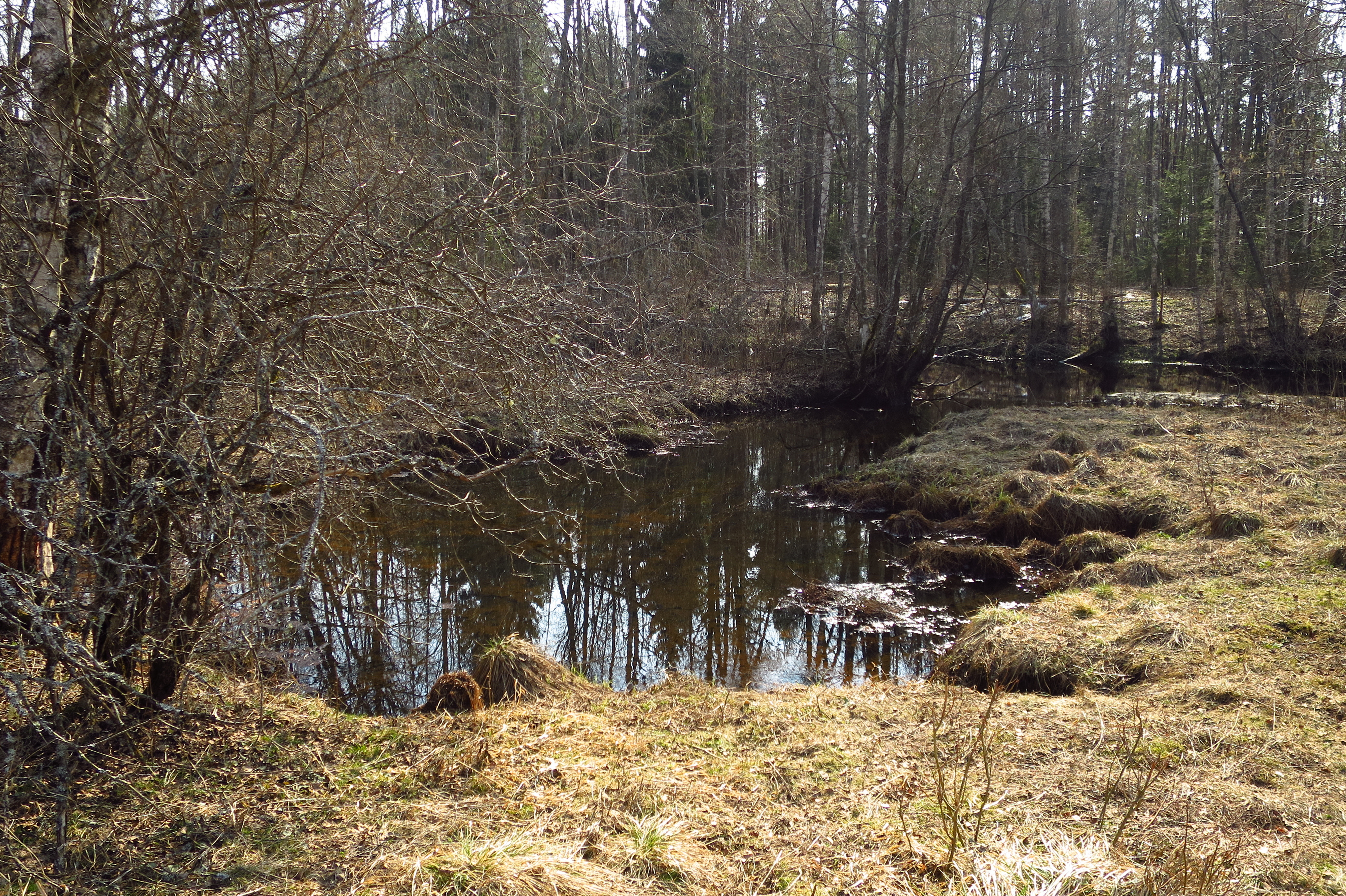 Ulmu allikas Mahtra looduskaitsealal